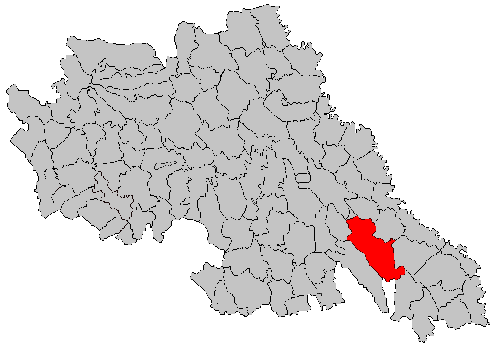 Categorie:Hărţi ale judeţului Iaşi